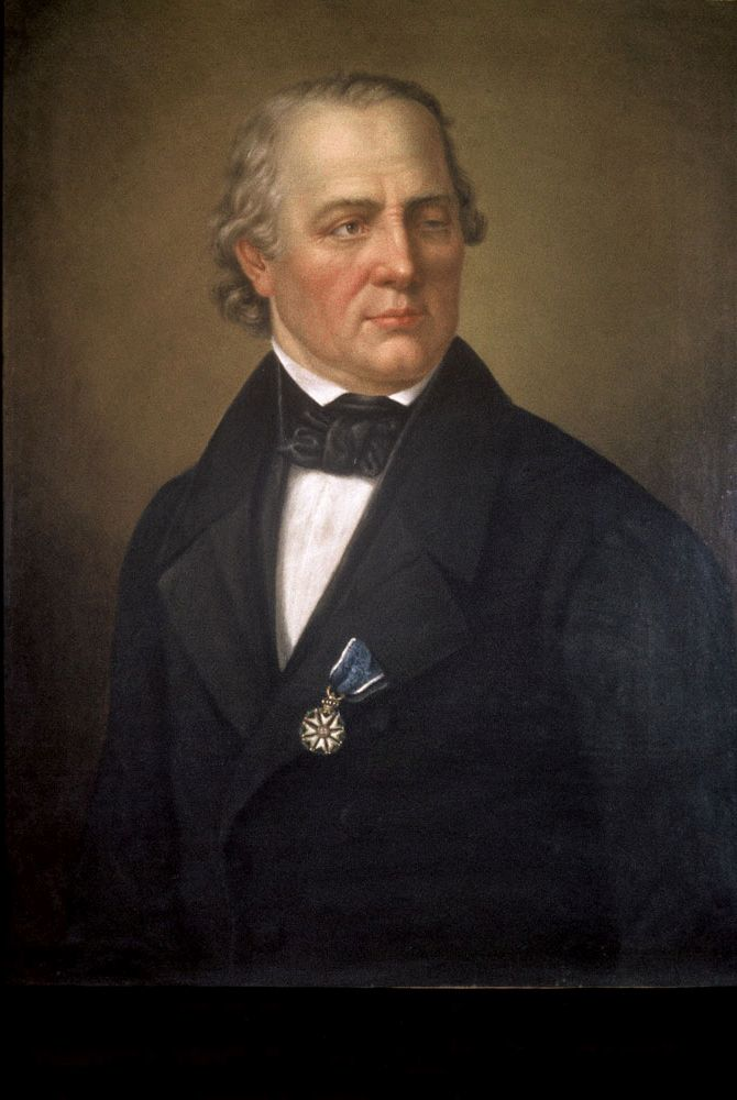 Joseph von Utzschneider, Münchner Bürgermeister, Förderer Frauenhofers